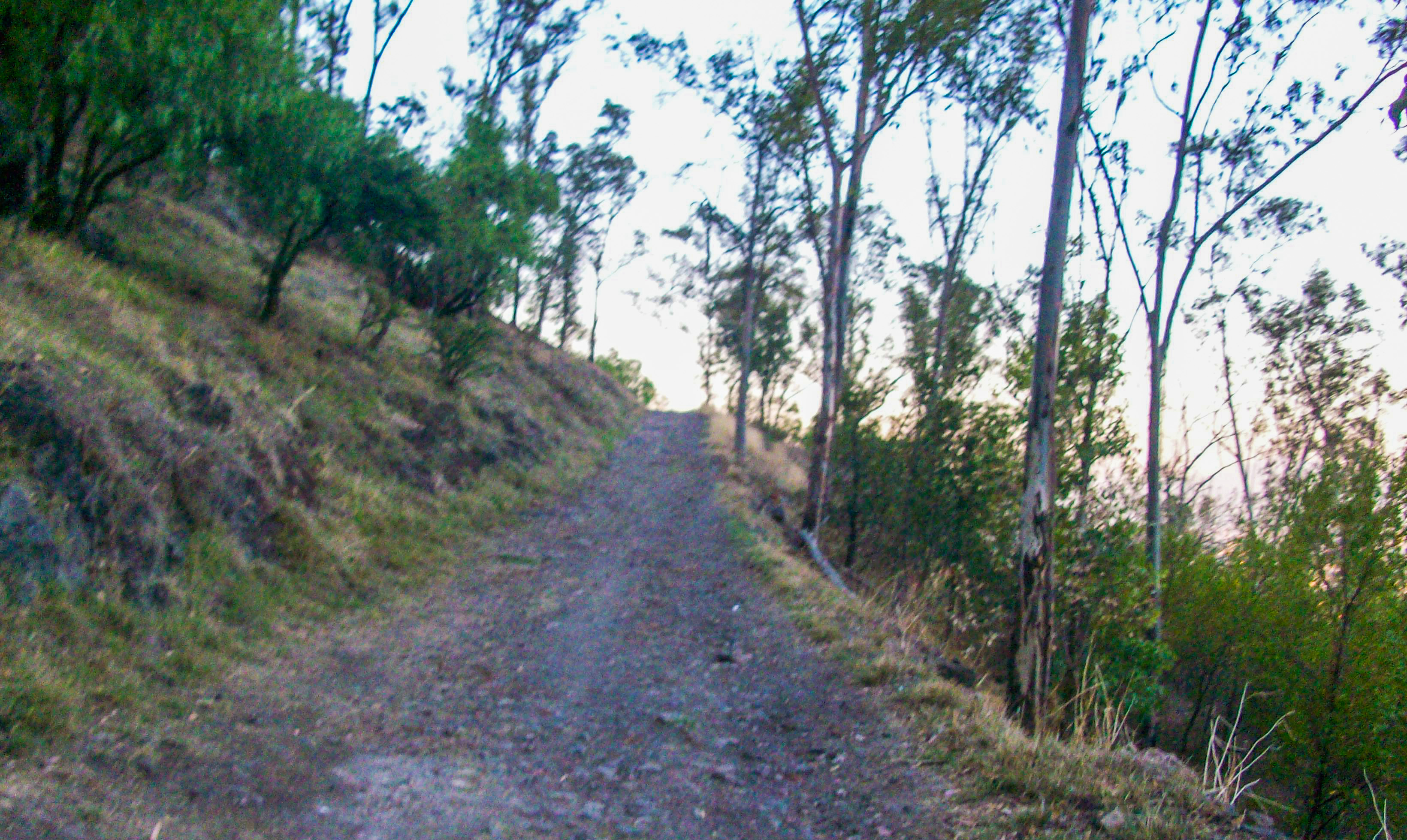 Parte o ladera de Santa Isabel Tola.